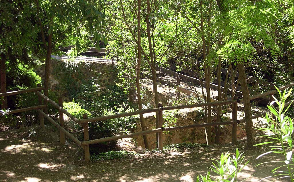 Vivarium (Viver) - detalle de los estanques de cria y engorde de peces en la época romana aprox. 200 a.C.